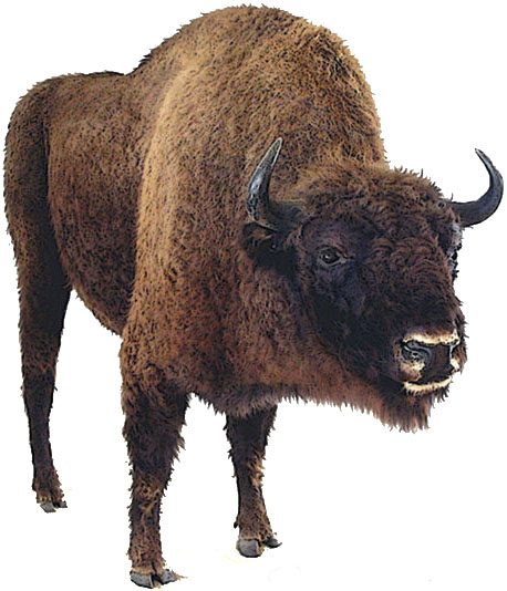 Illustration d'après un Bison naturalisé d'Eulalie en Margeride, France